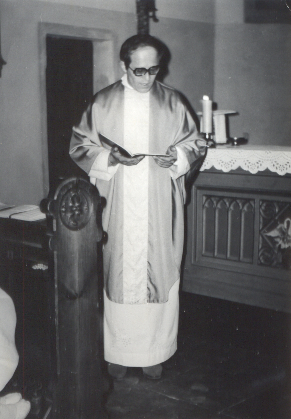 Duchovní správce farnosti Libochovany R.D. Jan Křepinský v kostele sv. Mikuláše ve Velkých Žernosekách, někdy mezi lety 1979-1988